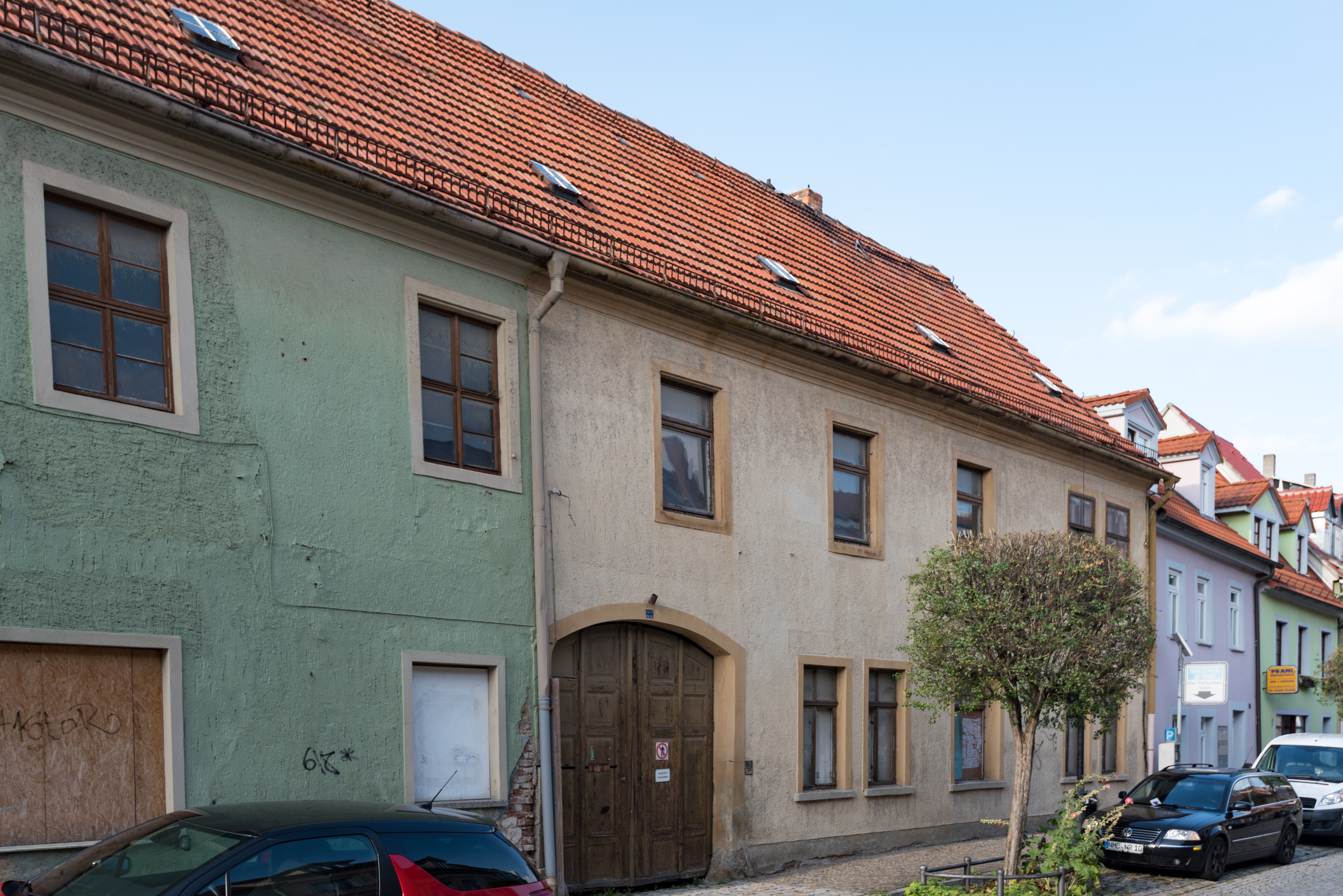 Naumburg (Saale), Neustraße 27